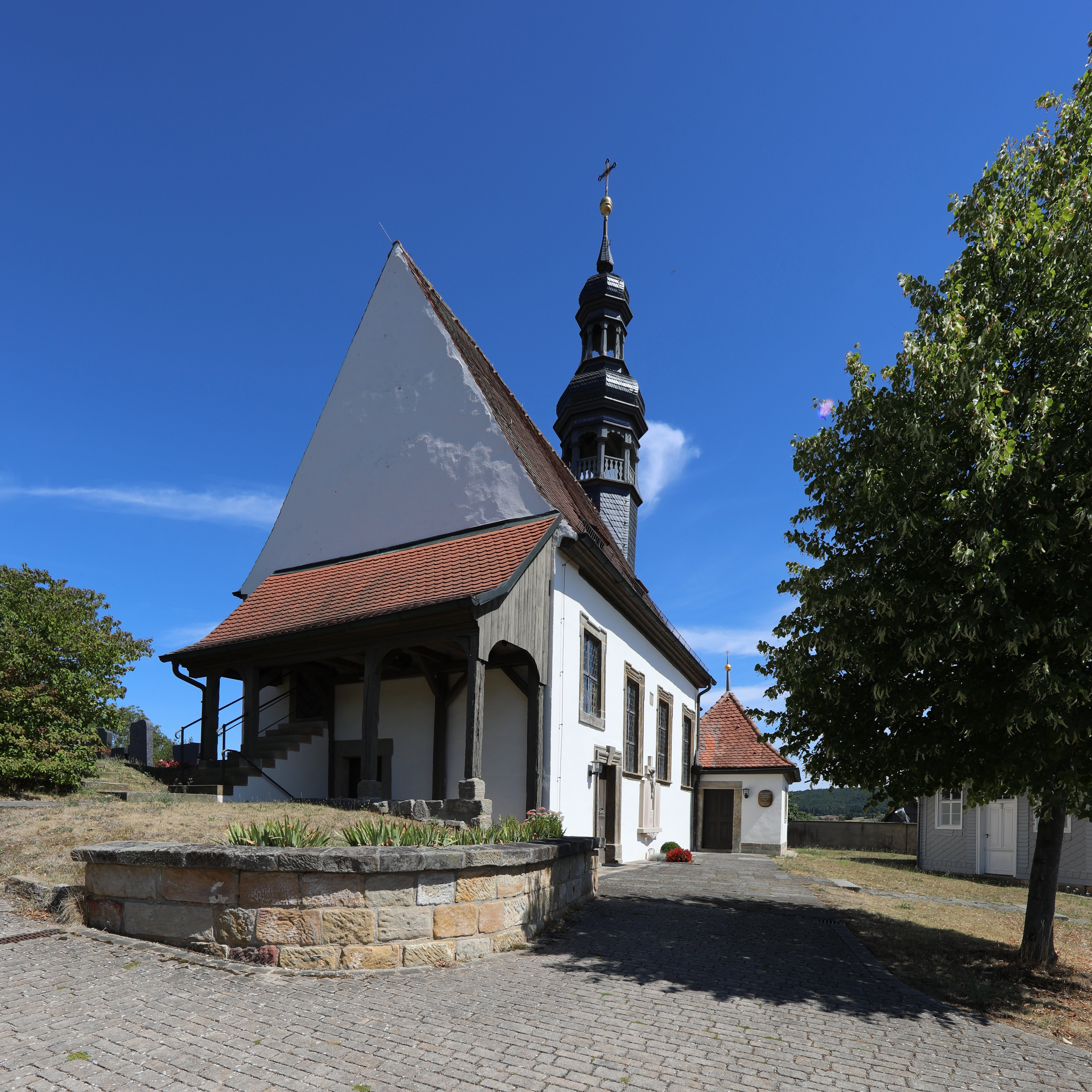 Katholische Filialkirche Mariä Geburt in Gleusdorf, Untermerzbach